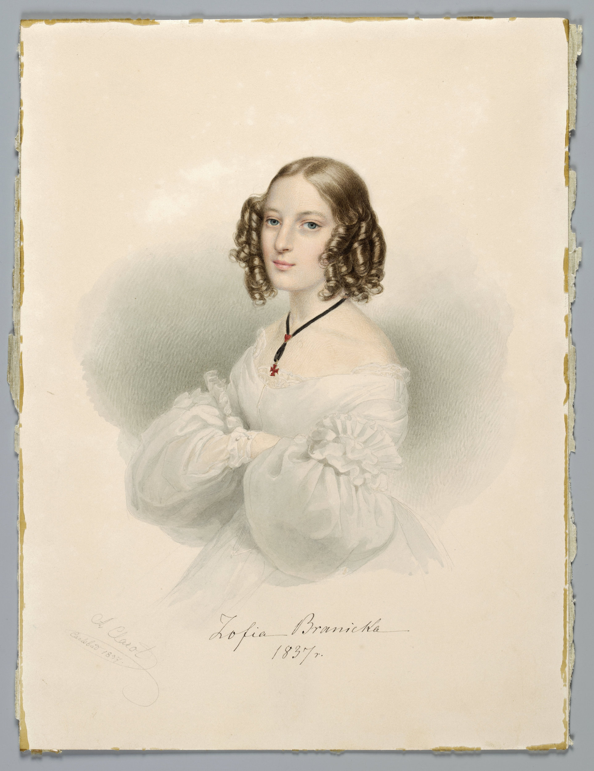 Alexander Clarot, Portret Zofii Branickiej, 1837, akwarela i ołówek na brystolu, Muzeum Narodowe w Warszawie